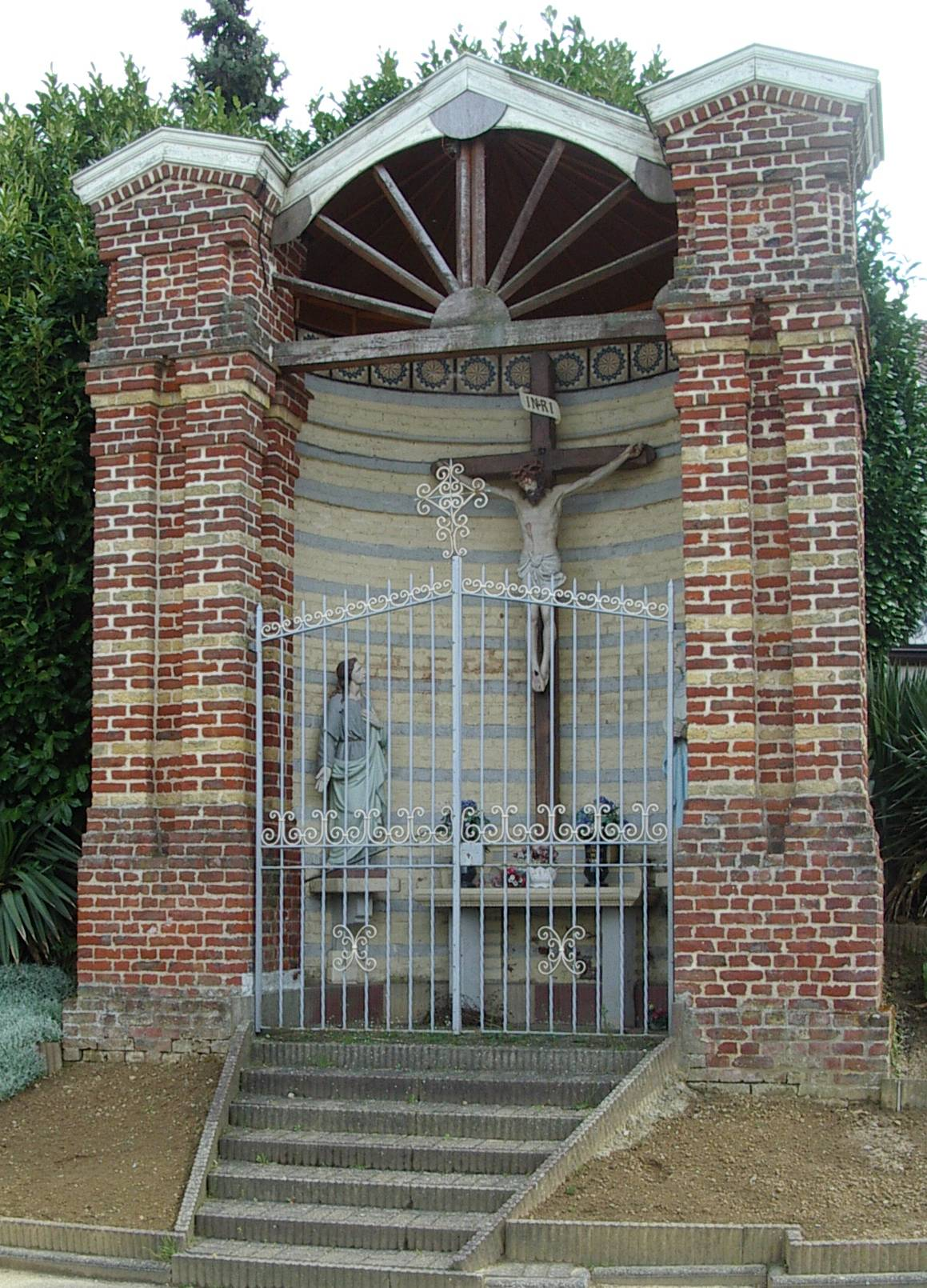 Calvaire Fin XIX siècle, situé à la croisée des chemins Catelot, d'Haussy, rues Paul Langevin et Benoit Frachon.Photo prise par J-C Houdot